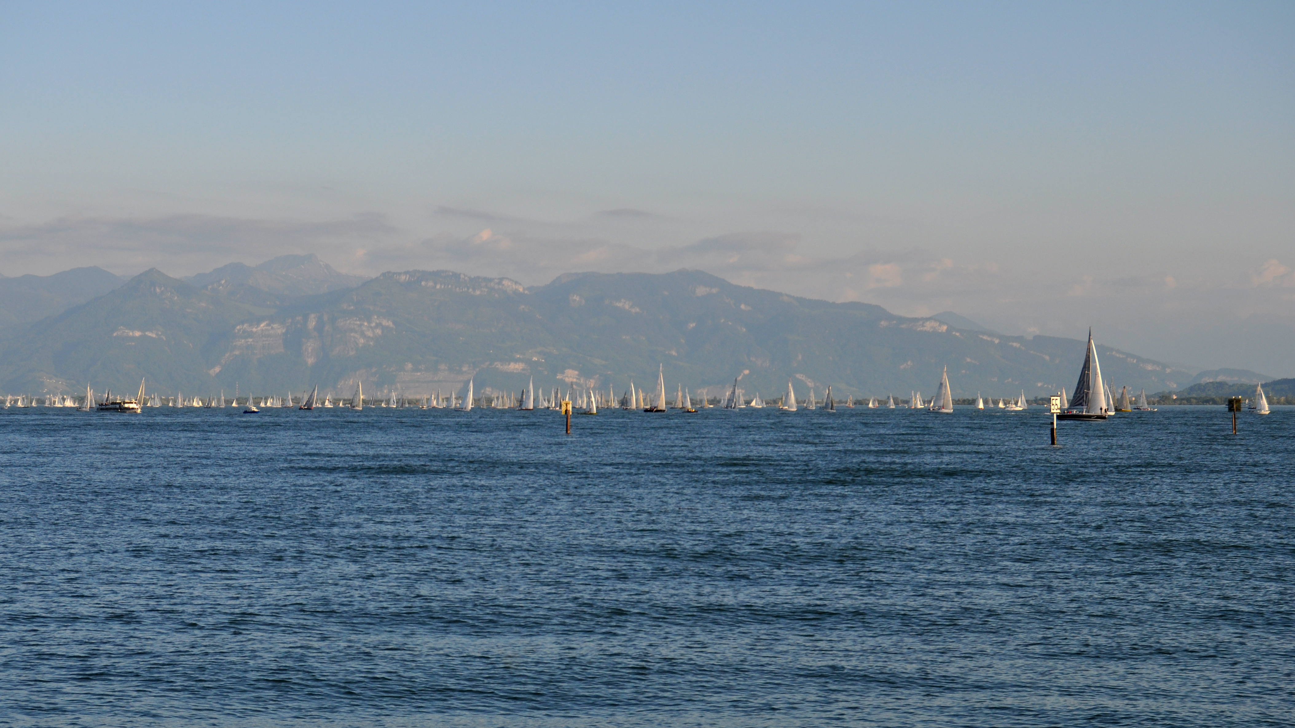 Starterfeld der RumUm kurz nach dem Startsignal um 19:30 Uhr vor der Inselstadt Lindau; von Wasserburg aus gesehen